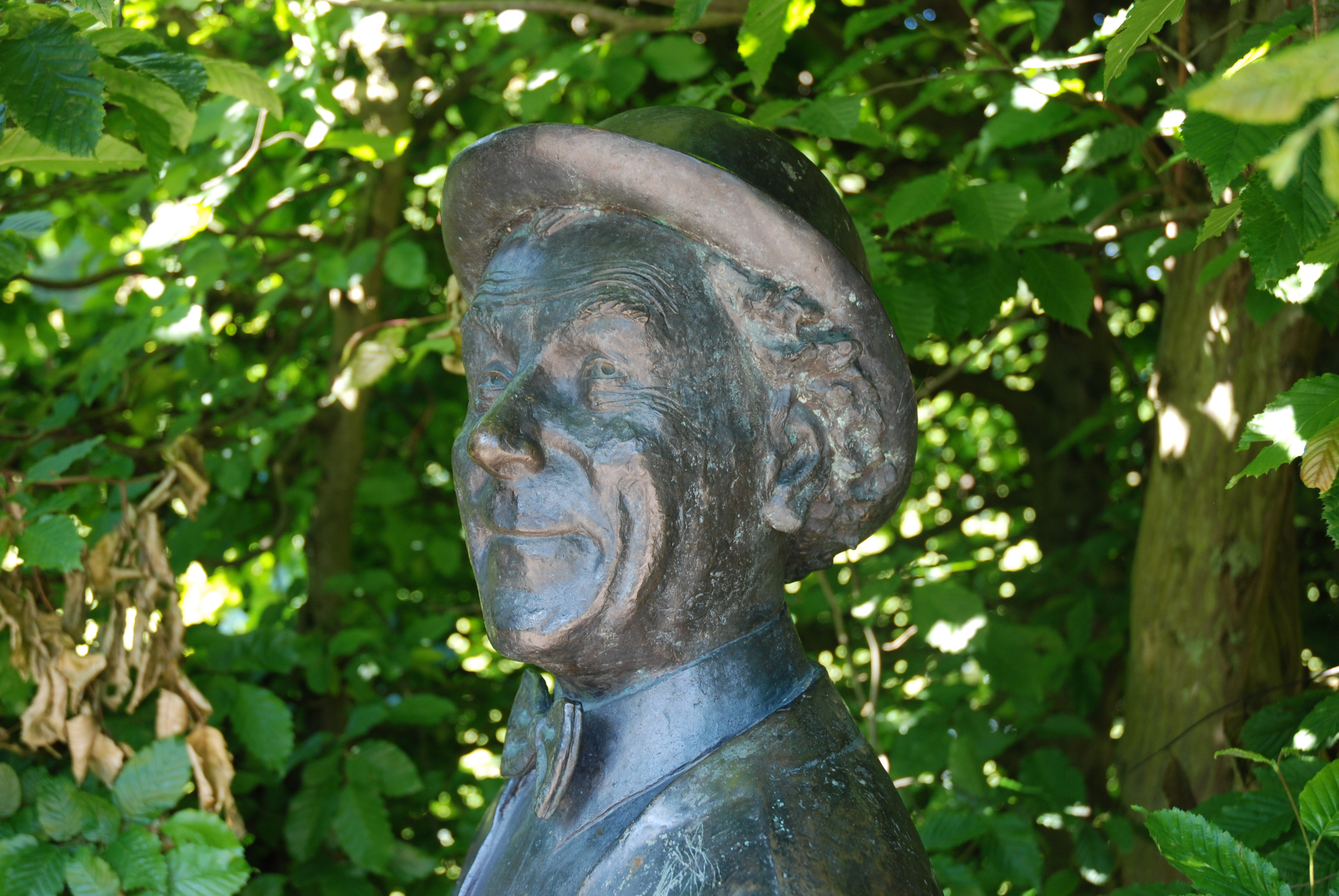 Detail of Jonas Hogström´s portrait of Nils Poppe, Fredriksdalsparken, Helsingborg